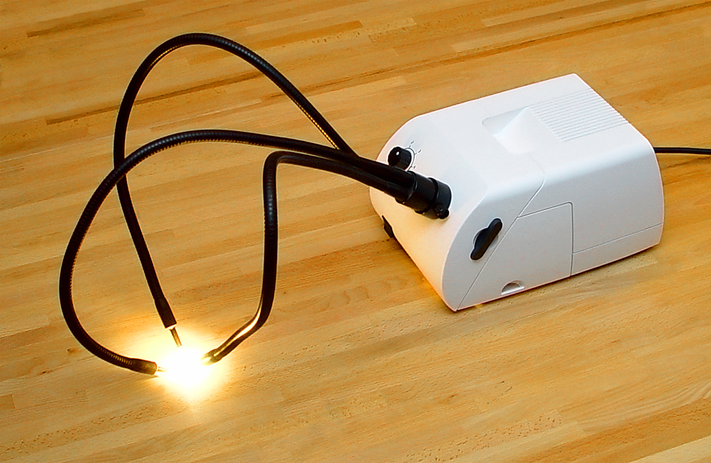 Beschreibung: Kaltlichtquelle mit dreiarmigem Lichtleiter Aufnahmedatum: 15. März 2007 Fotograf: ArtMechanic